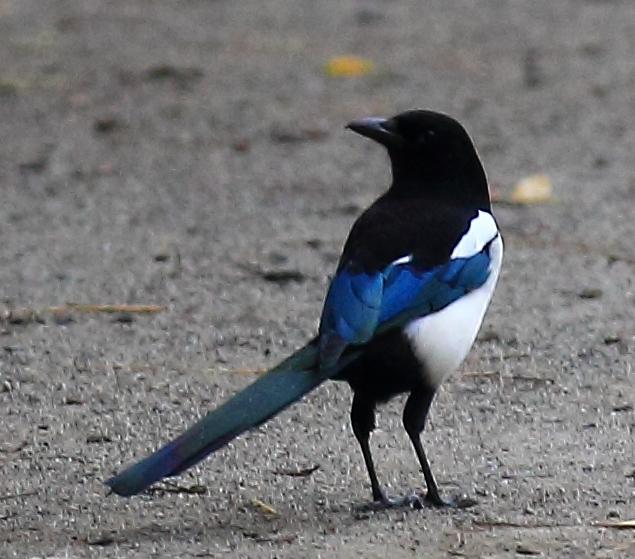 Pica pica, Jardin Compans Caffarelli, Toulouse, France